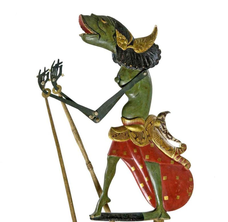 Pop. Wayang Kelitik pop, Menak Jingga voorstellende